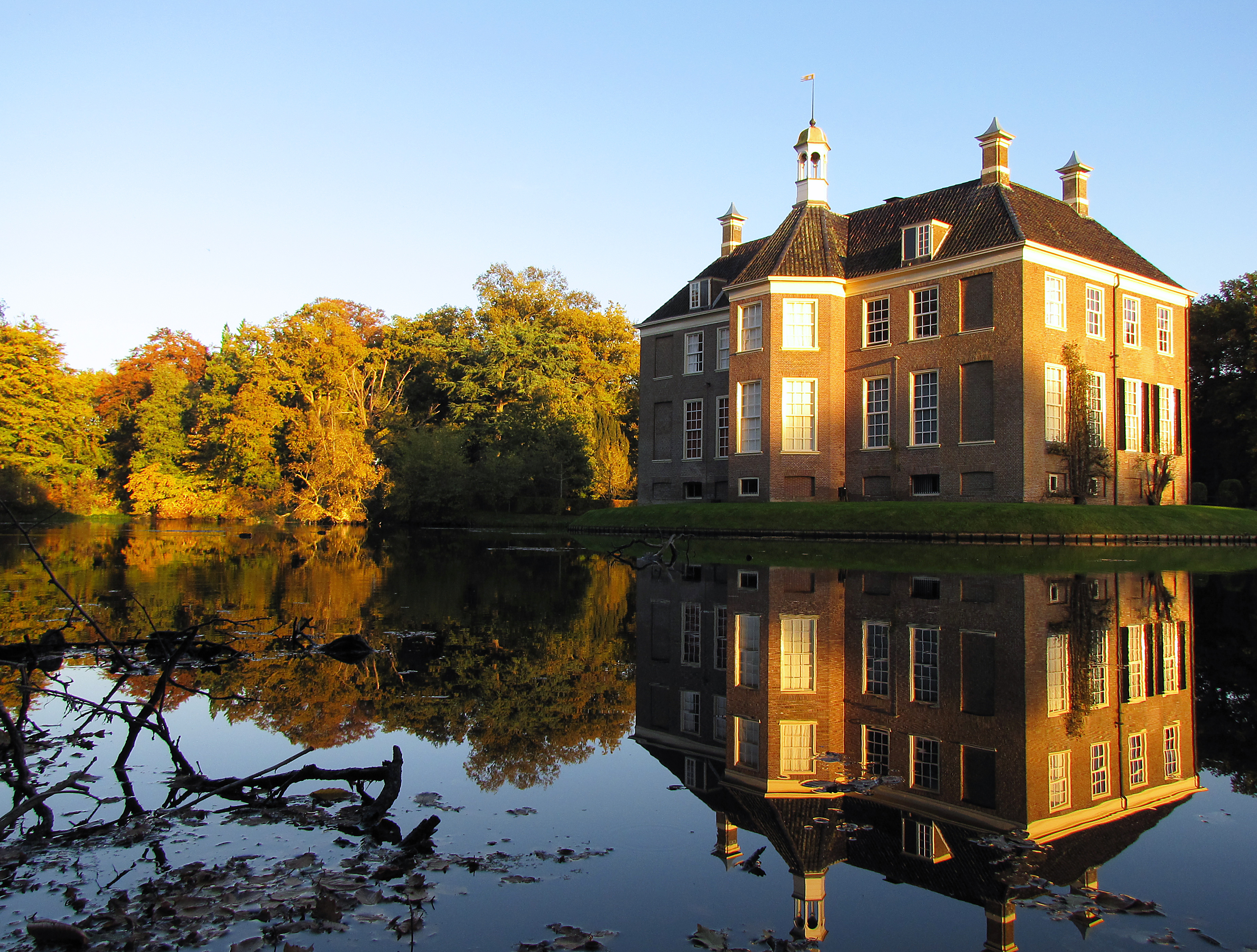 Ook de afgebroken takken en afgewaaide bladeren in het water passen in de romantiek van de Indian Summer. Zij zijn een schuilplaats voor de vissen.